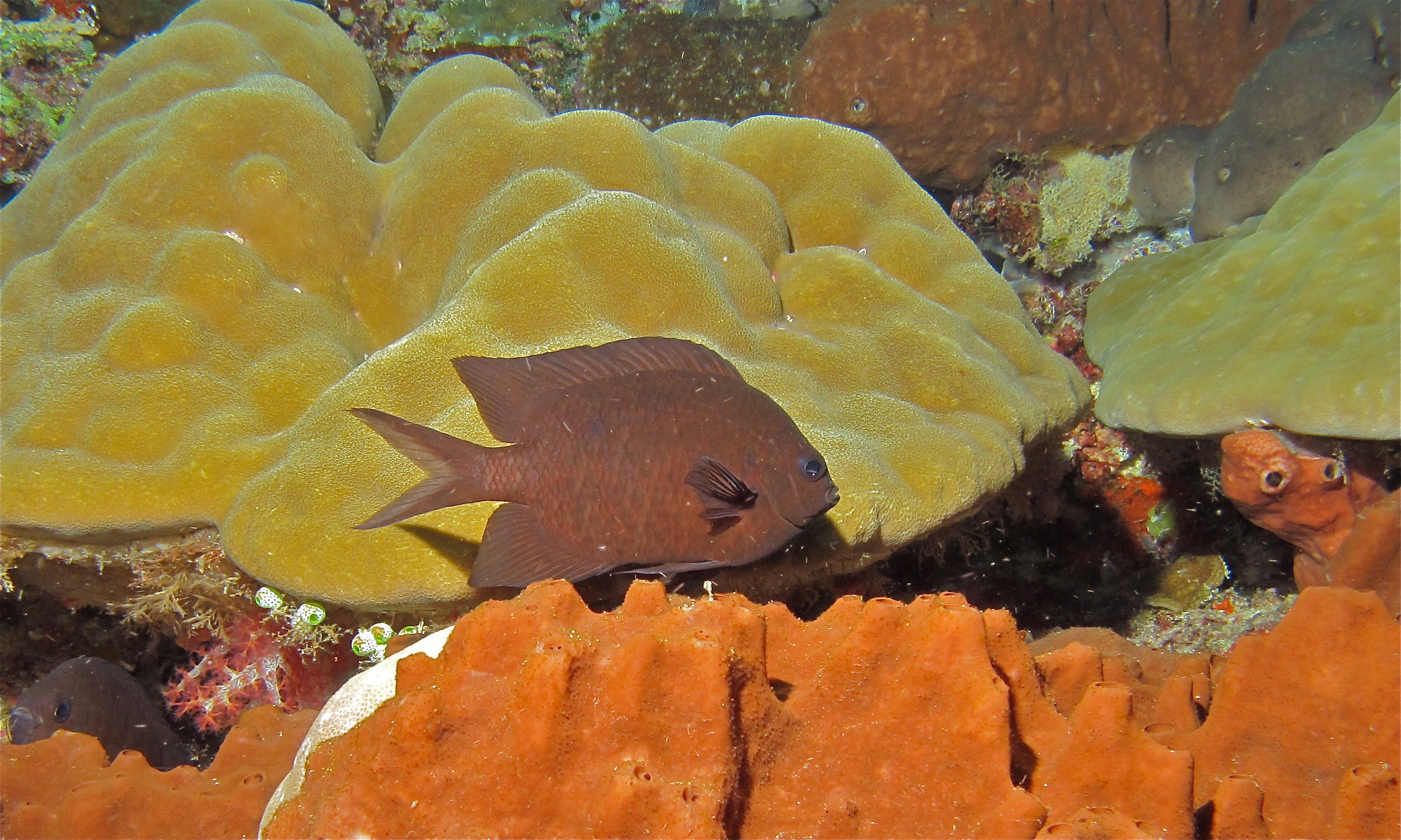 Muka, Bunaken Island, Sulawesi, INDONESIA